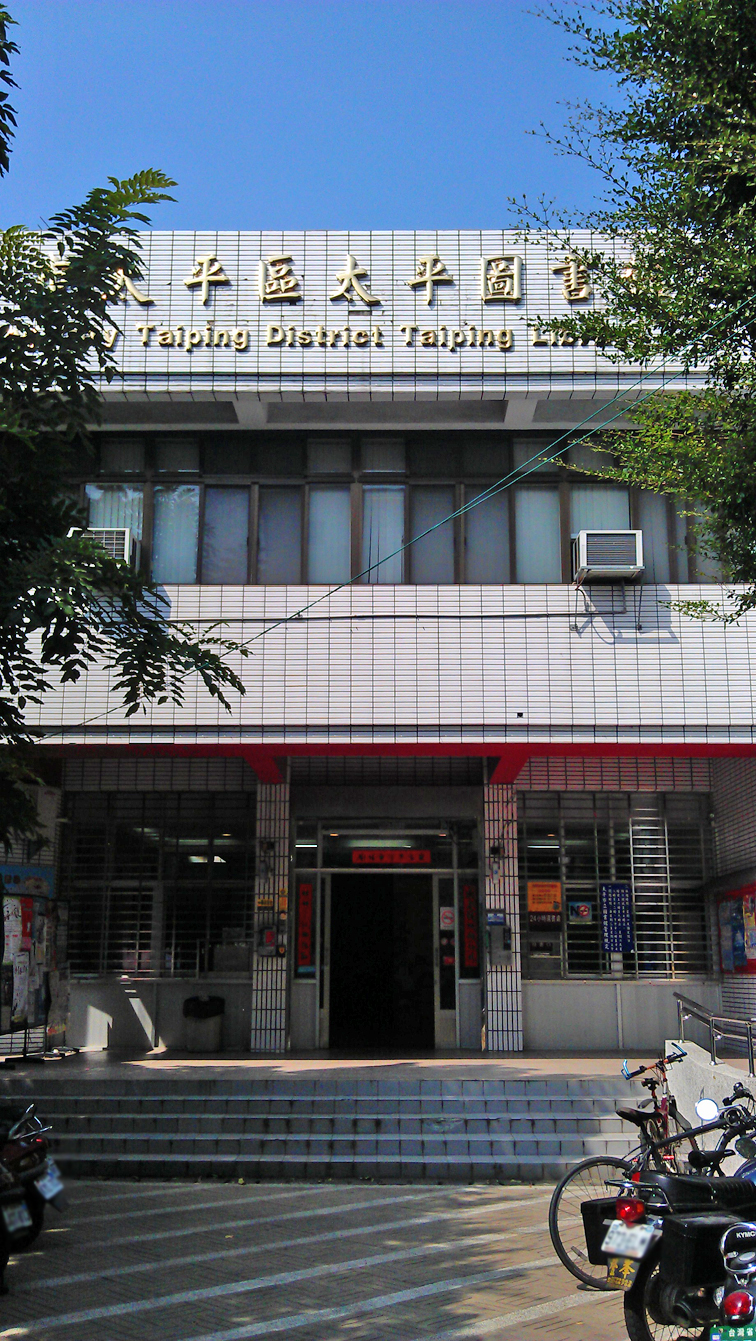 中文（台灣）: 臺中市太平區太平圖書館